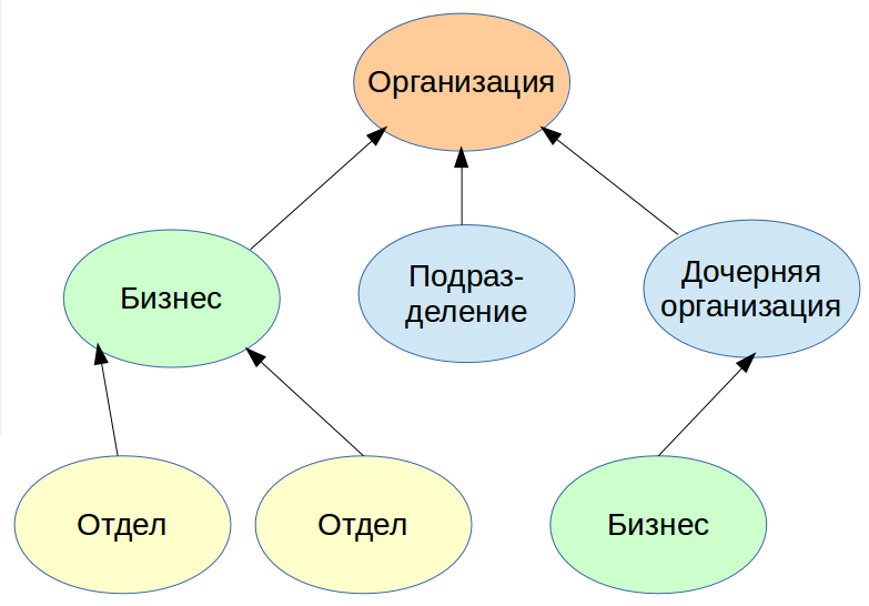 Схема структуры организации в Microsoft Dynamics CRM